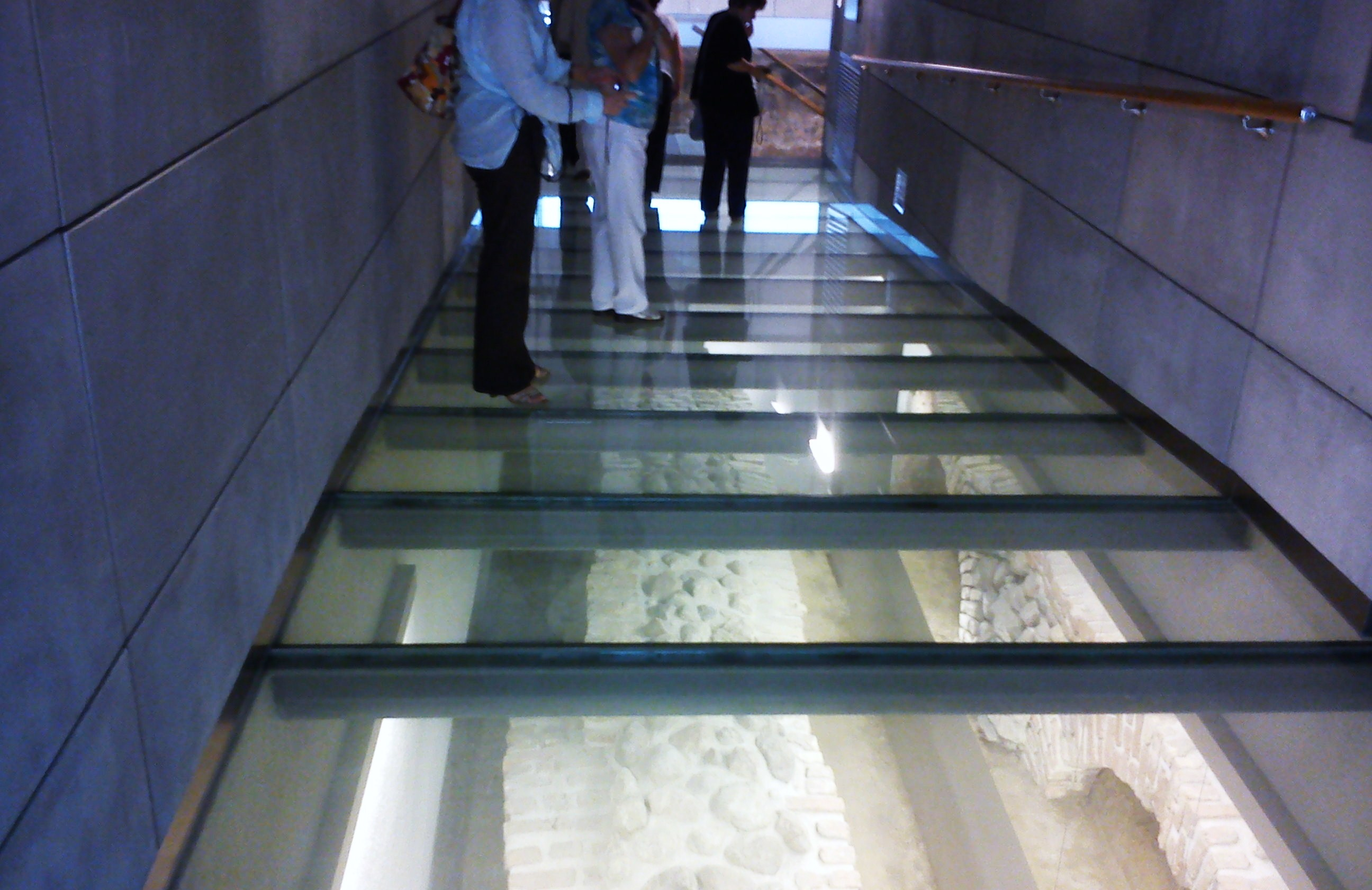 Rezerwat archeologiczny Genius Loci - Poznań, Ostrów Tumski.